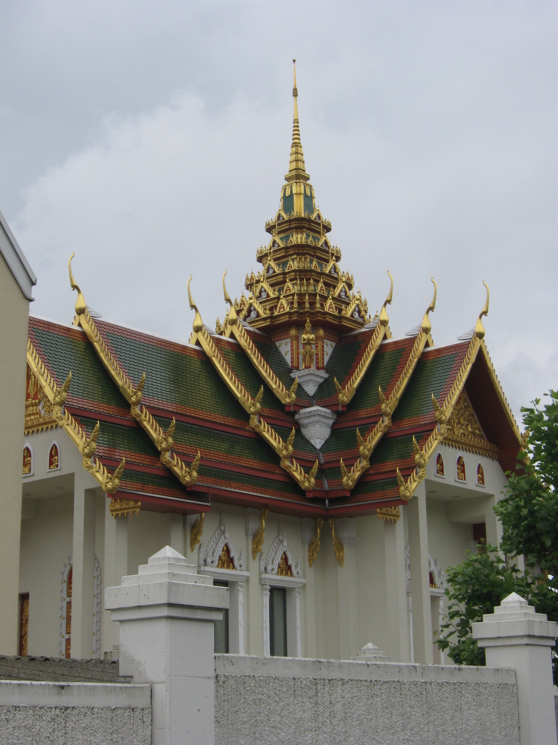 Die buddhistische Tempelanlage Wat Srinagarindravararam in Gretzenbach im Kanton Solothurn wurde 1996 eingeweiht und 2003 im traditionellen thailändischem Baustil fertiggestellt.